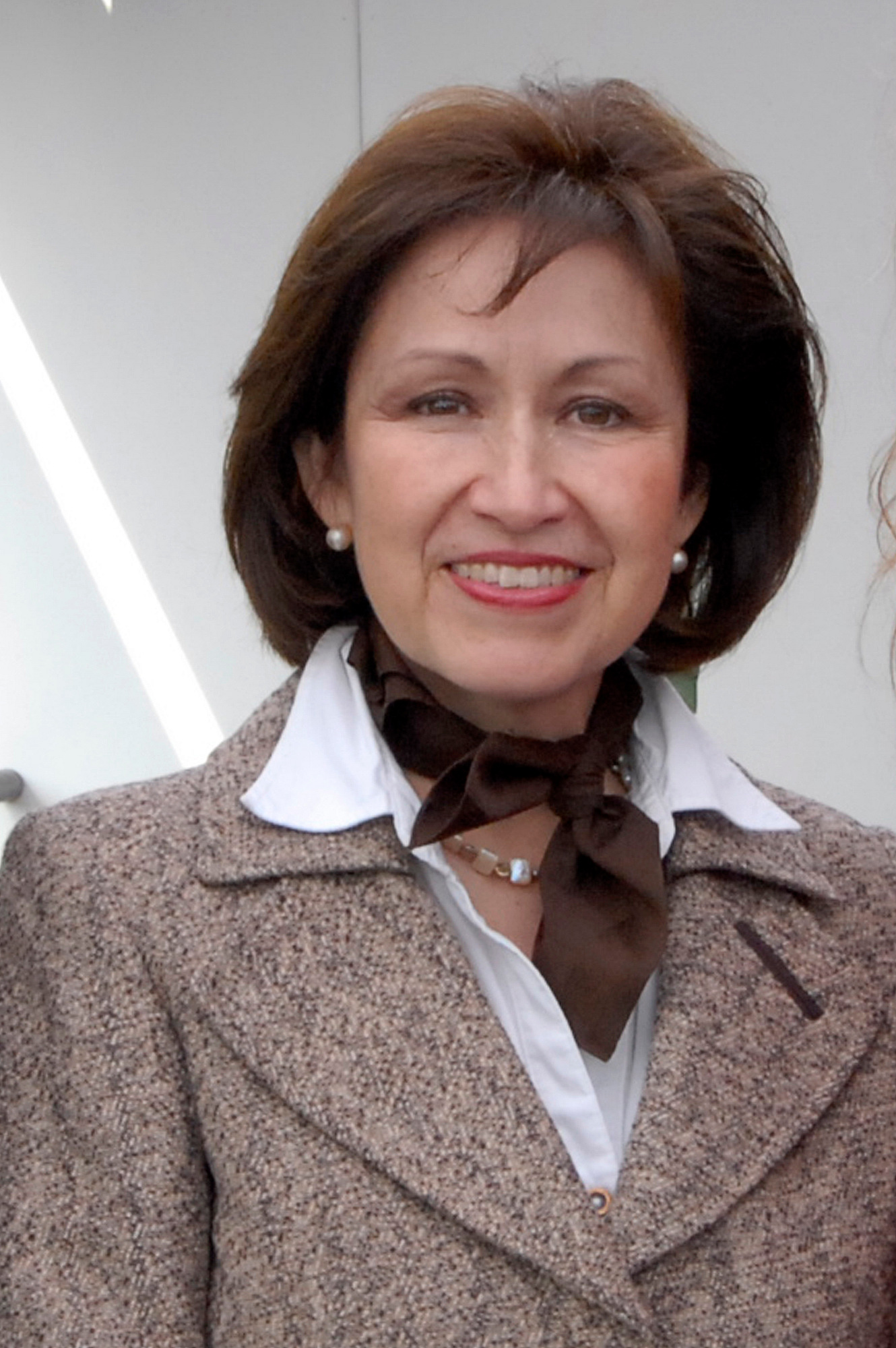 Profesora de derecho político y constitucional chilena.